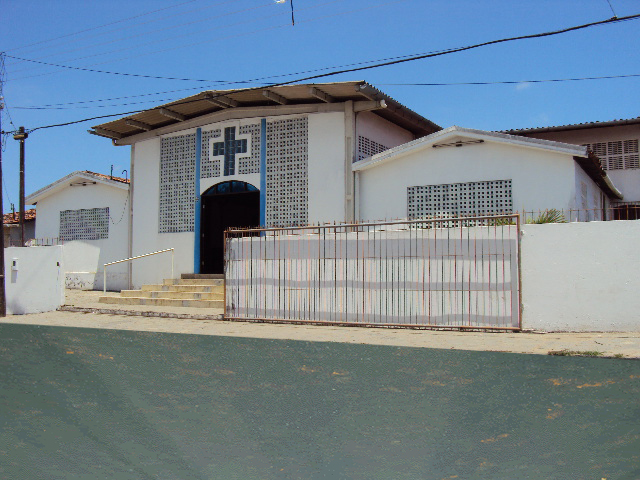 Igreja de Nossa Senhora das Graças. João Pessoa, PB.